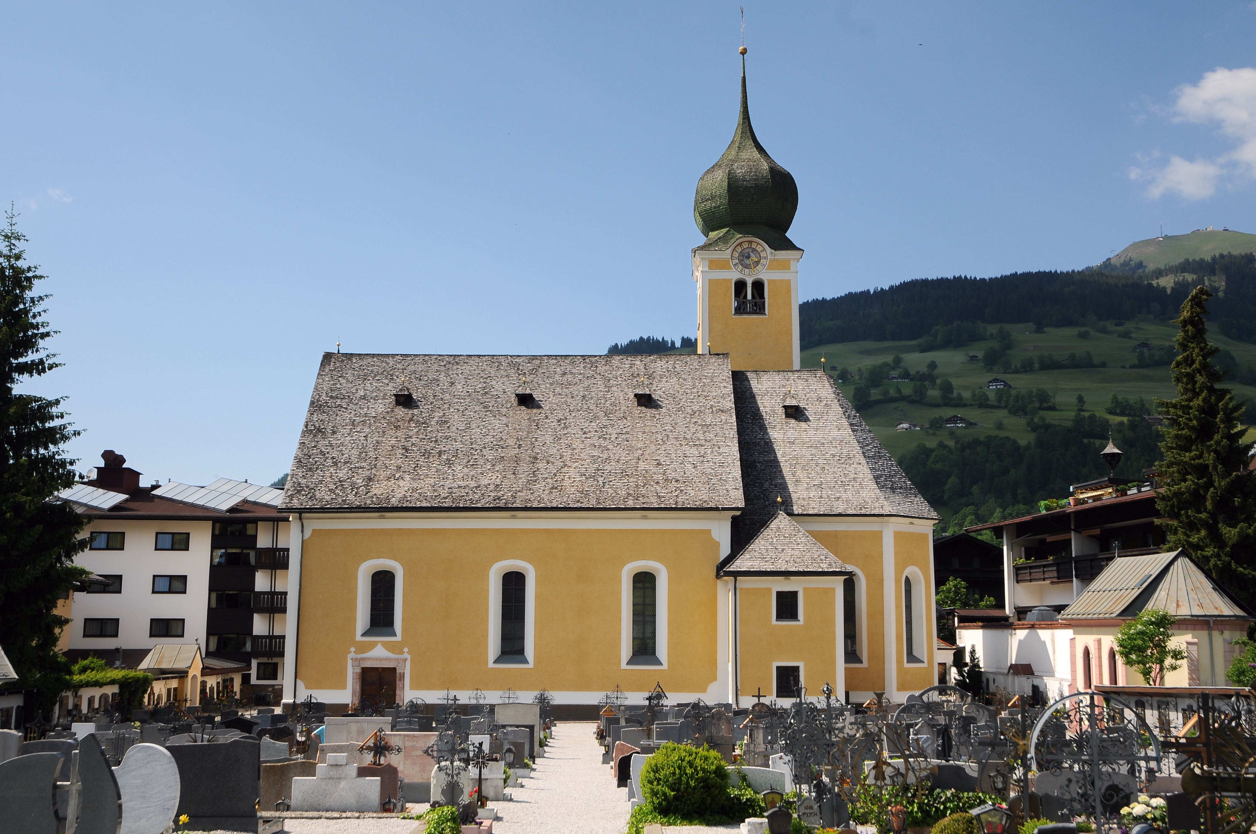 Die Pfarrkirche hl. Nikolaus der Gemeinde Westendorf (Tirol).